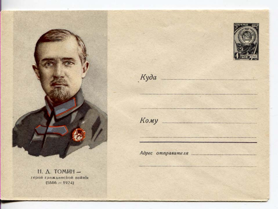 Томин Николай Дмитриевич, почтовый конверт